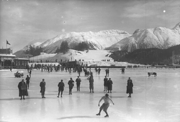 Die große Winter-Olympiade in St Moritz! Neueste Aufnahmen von unserm nach St. Mortiz entsandten Sonder-Bild-Berichterstatter. Nach kurzer Pause wurde als Erstes das Eiskunstlaufen für Herren fortgesetzt. Weltmeister im Eiskunstlaufen Grafström/Schweden beim Pflichtlaufen vor der Jury.